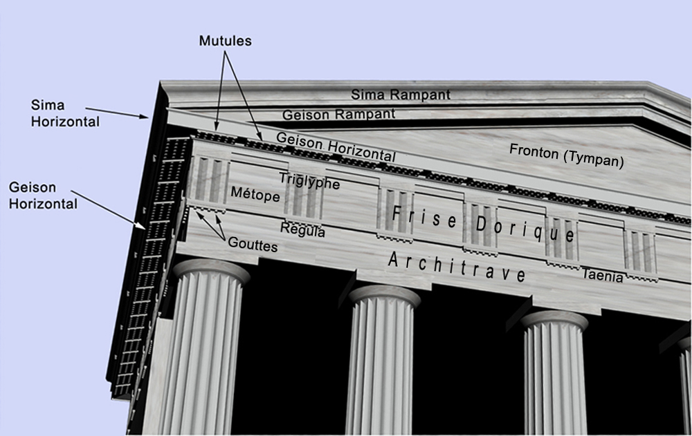 traduction de Fichier:Doric-order-labeled.jpg